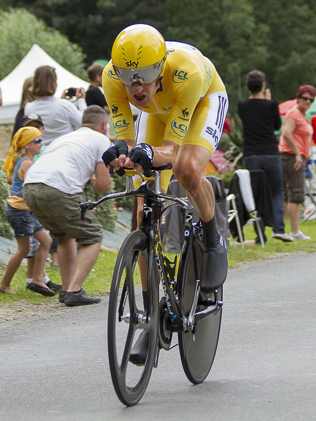 Le maillot jaune Bradley WIGGINS (SKY) en action - 19e étape du Tour de France 2012, Contre la montre individuel entre Bonneval et Chartres (Eure-et-Loire) à Morancezu (45 km) le samedi 21 juillet 2012 - © William Morice / MaxPPP